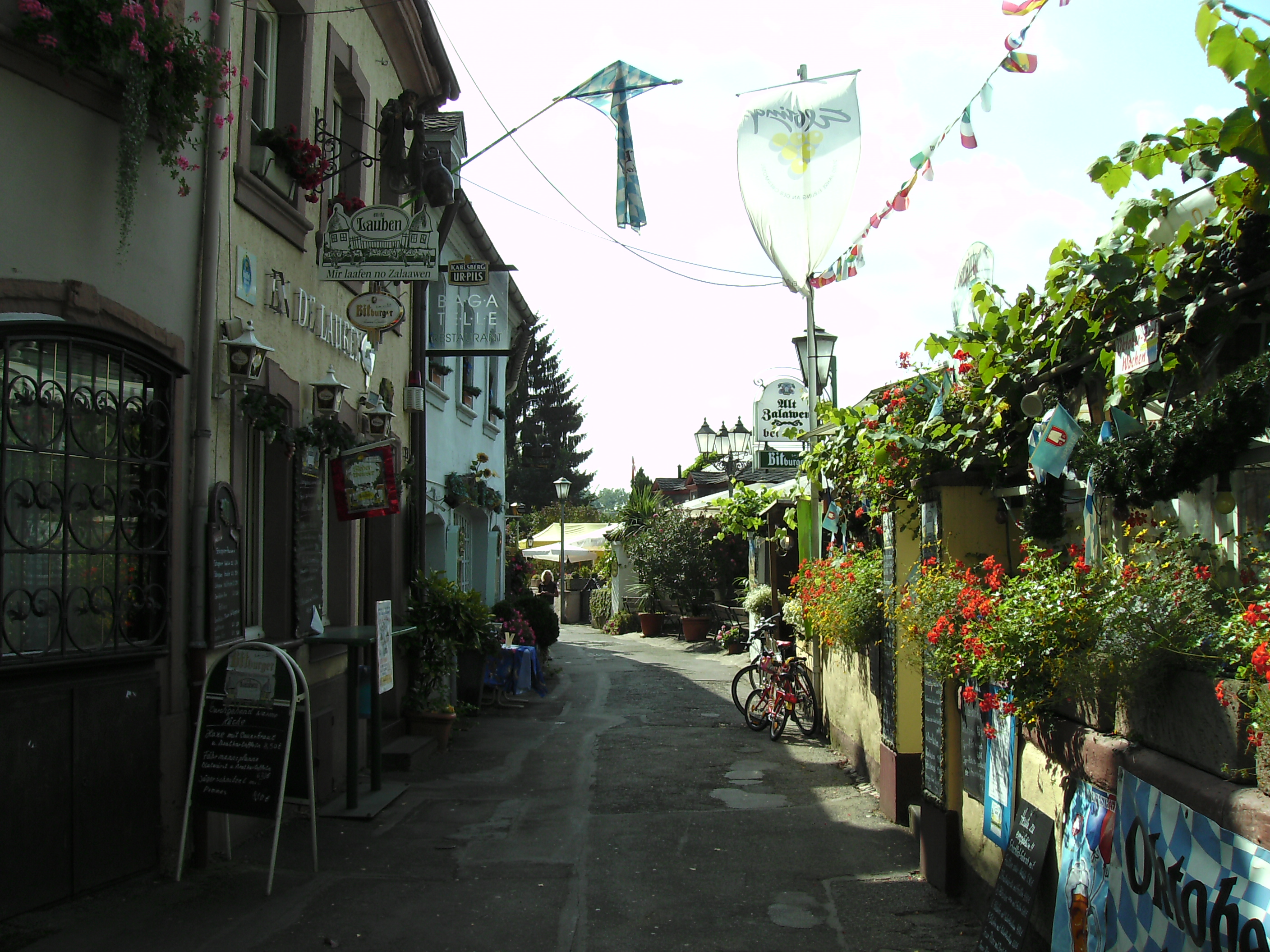 Trierer altes Fischer-Viertel "Alt Zalawen"